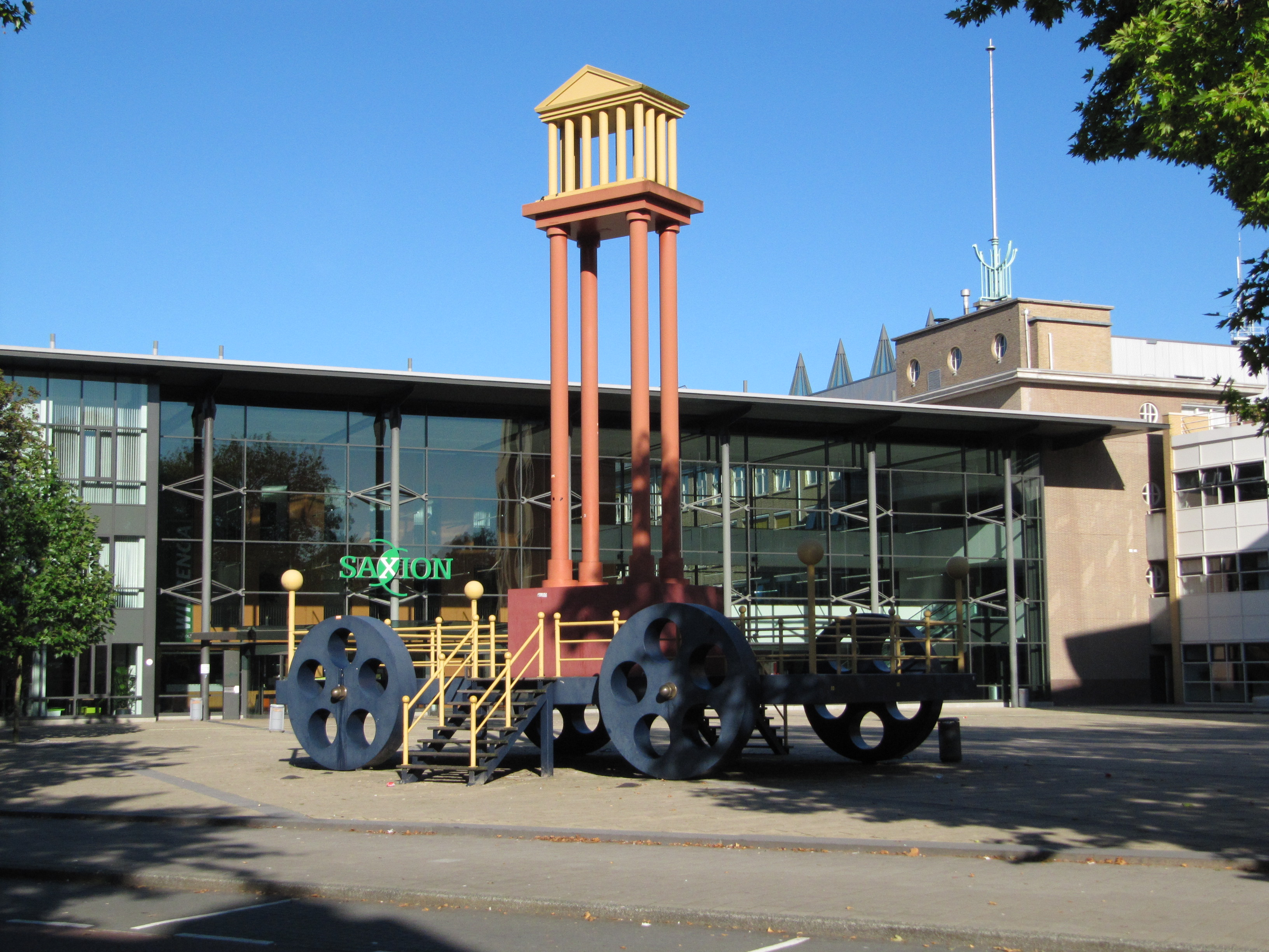 Saxion Enschede 2010